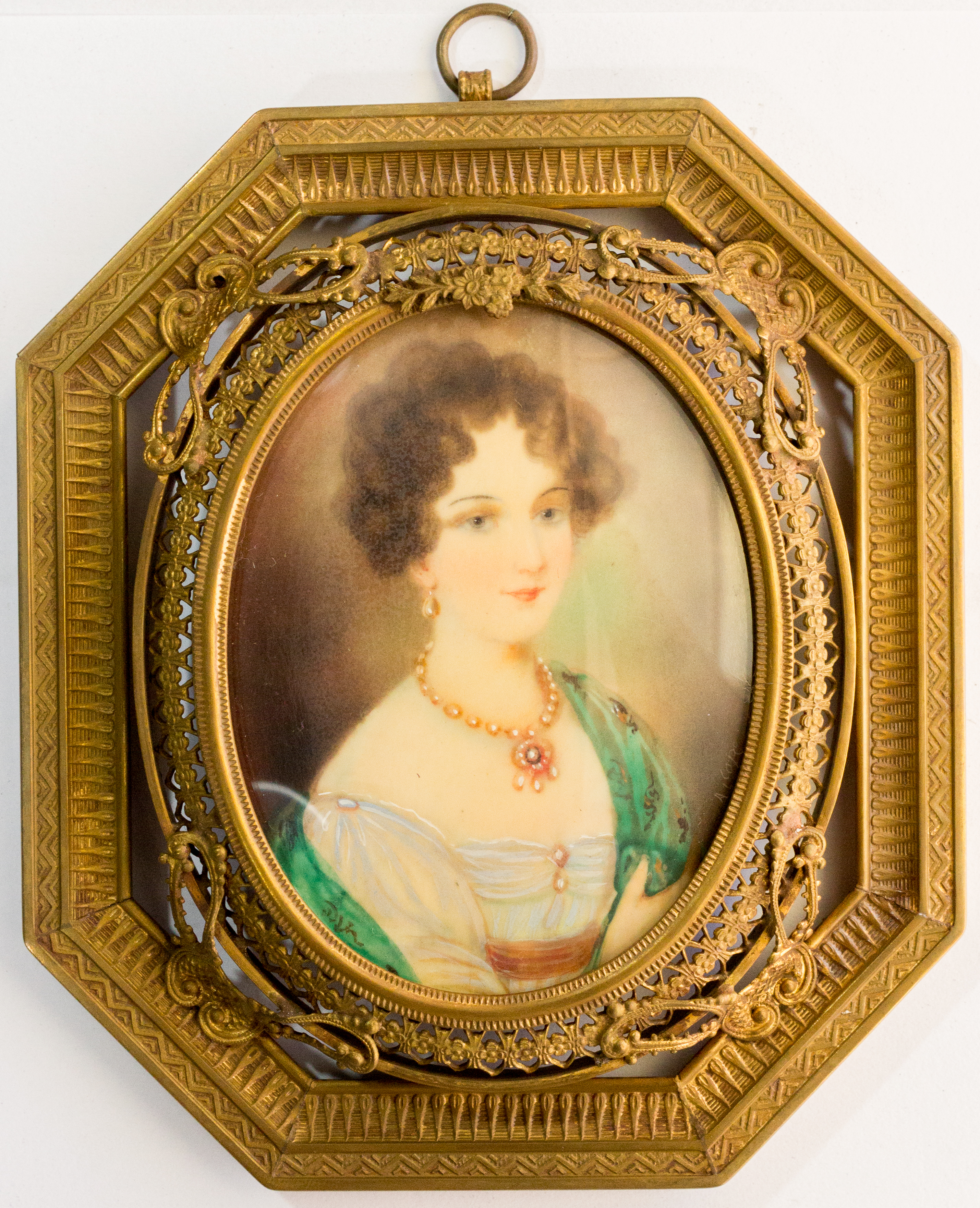 Obra da coleção Brasiliana Iconográfica.